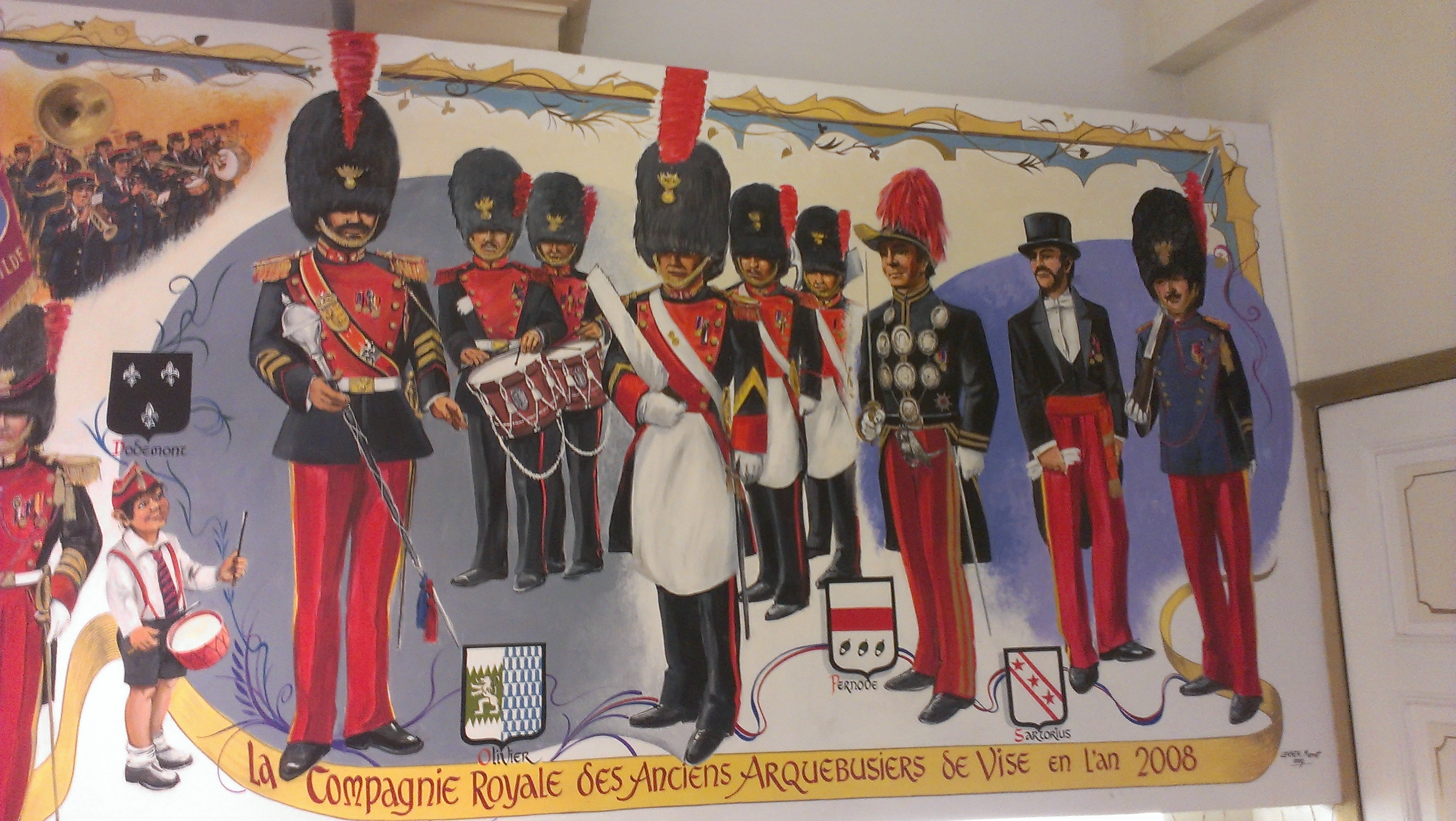 Museum van schutterij / kloveniersgilde "Compagnie royale des Anciens Arquebusiers" in Visé, in november 2017.